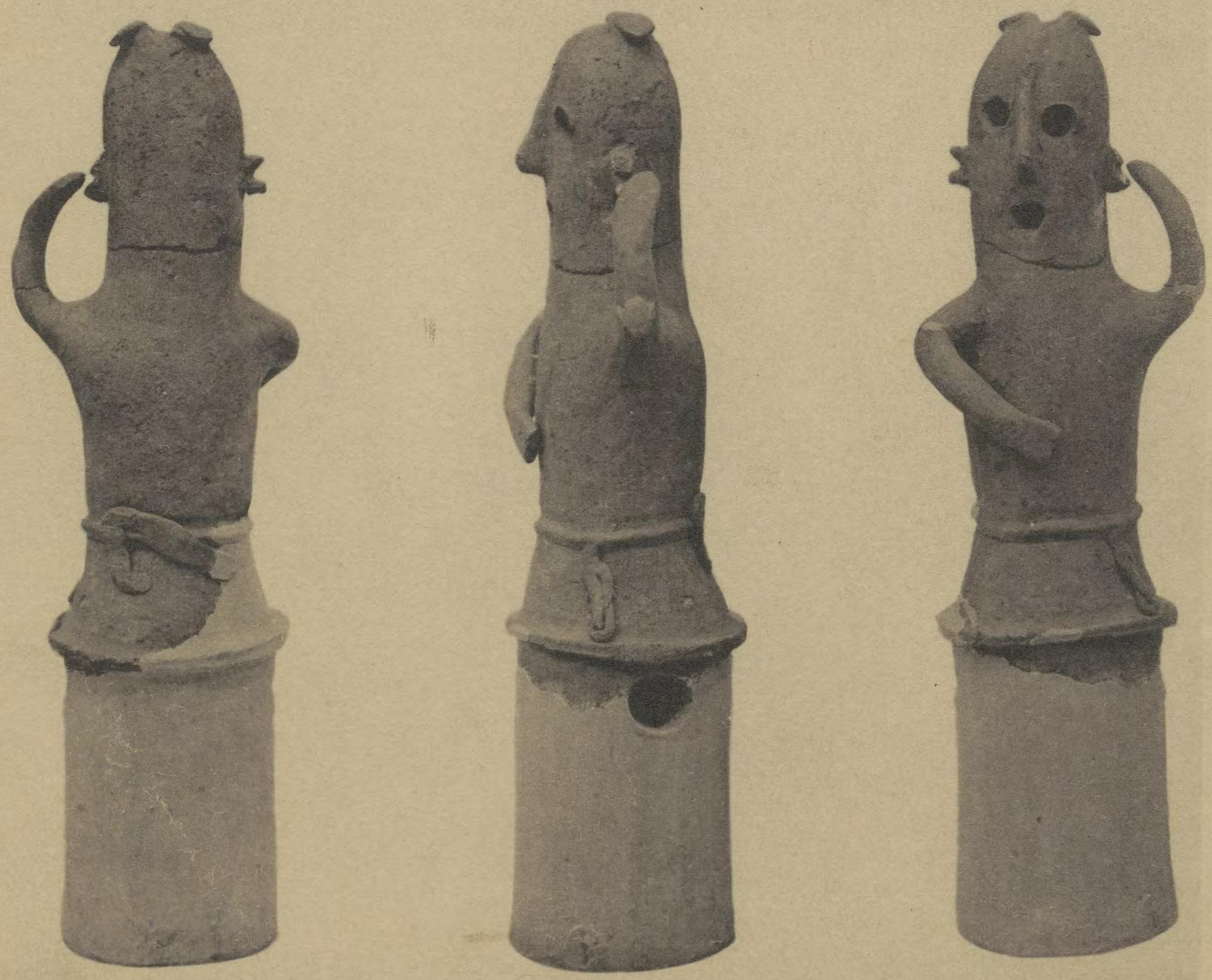 埴輪 踊る人々（小）の三面（正面・左・背面）。